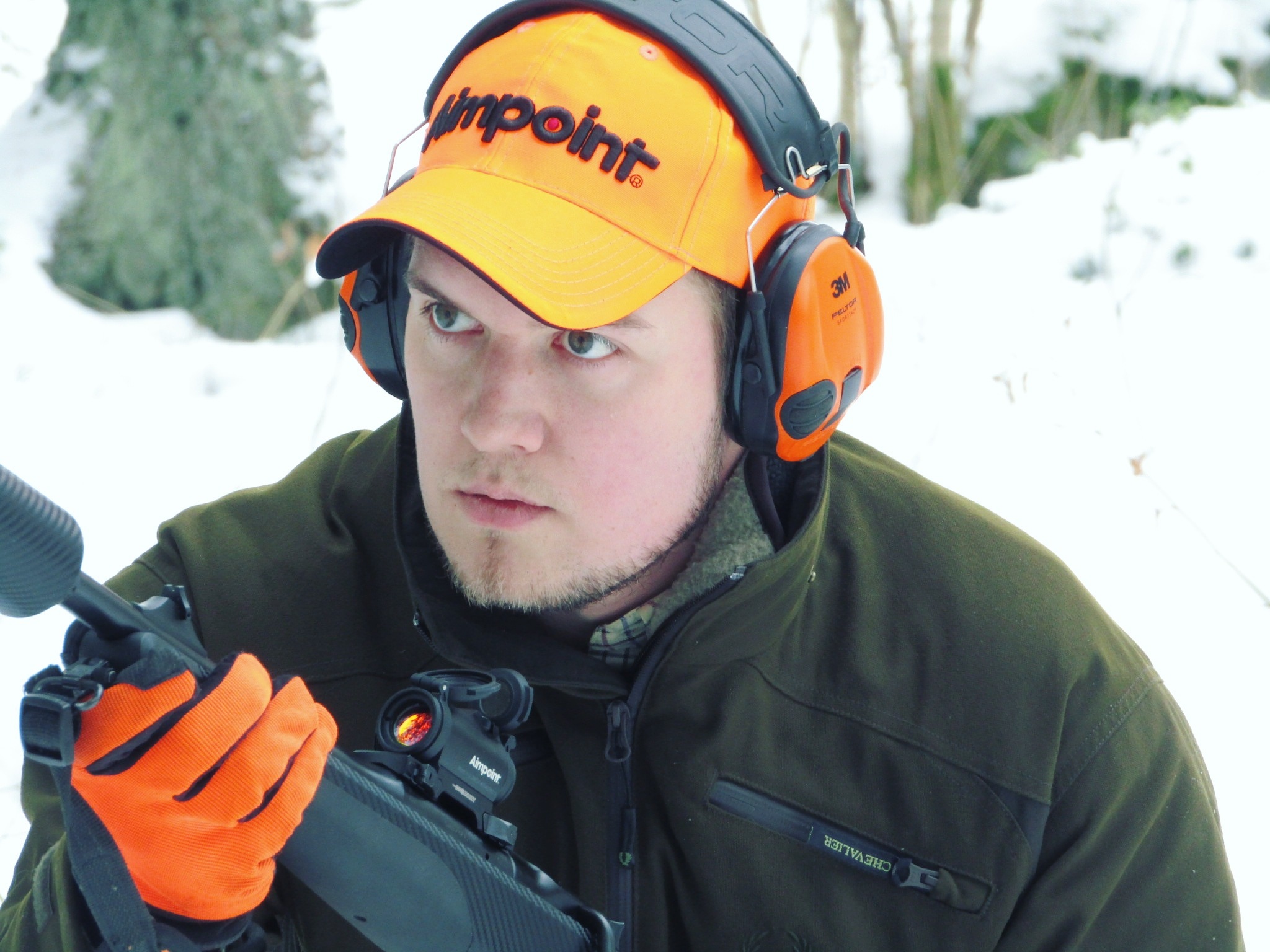 Hunter with Aimpoint Micro H-2